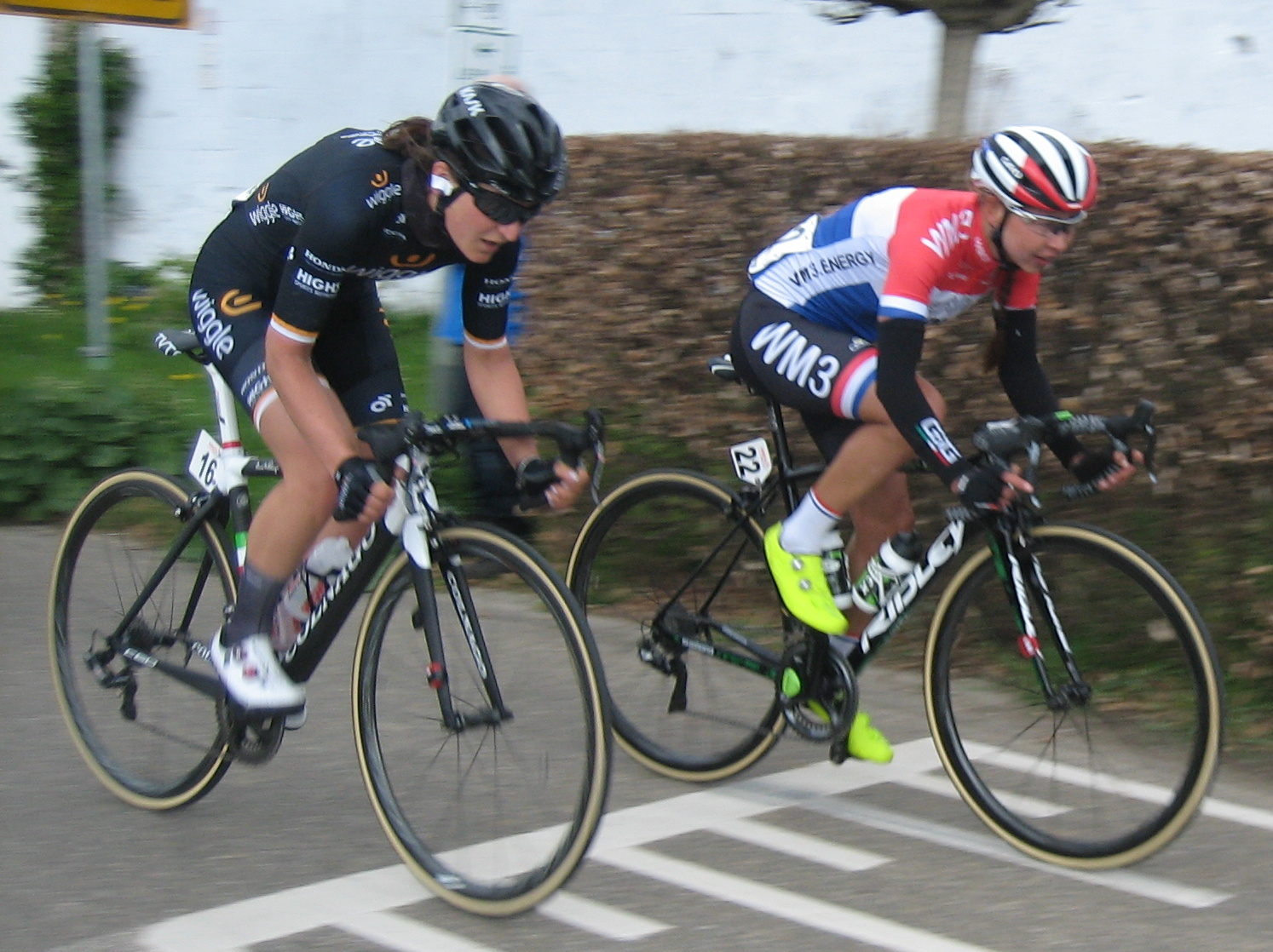 Na 77km, boven op de Bemelerberg, in de Amstel Gold Race Ladies Edition 2017.